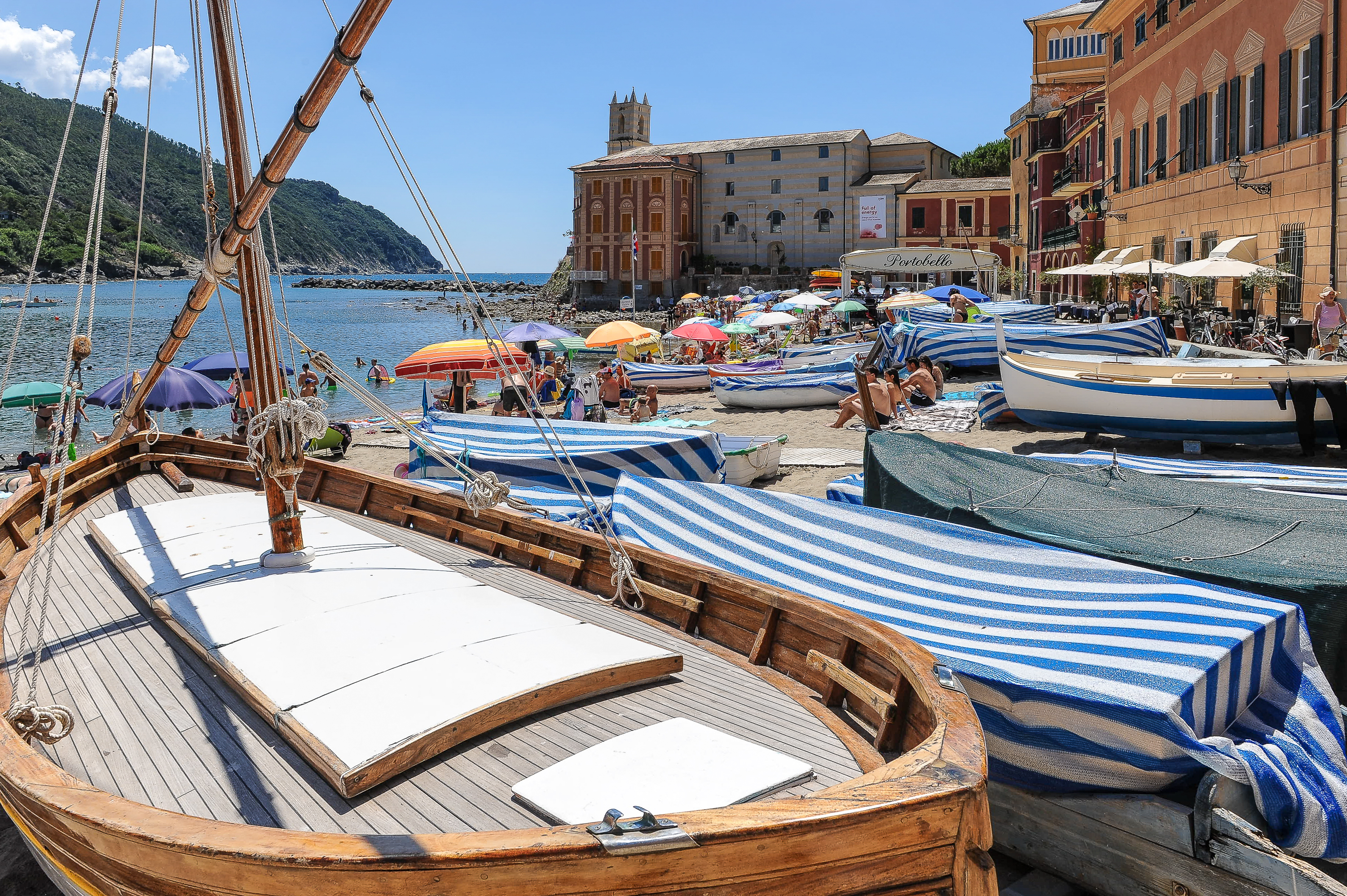 Sestri Levante, Baia del Silenzio